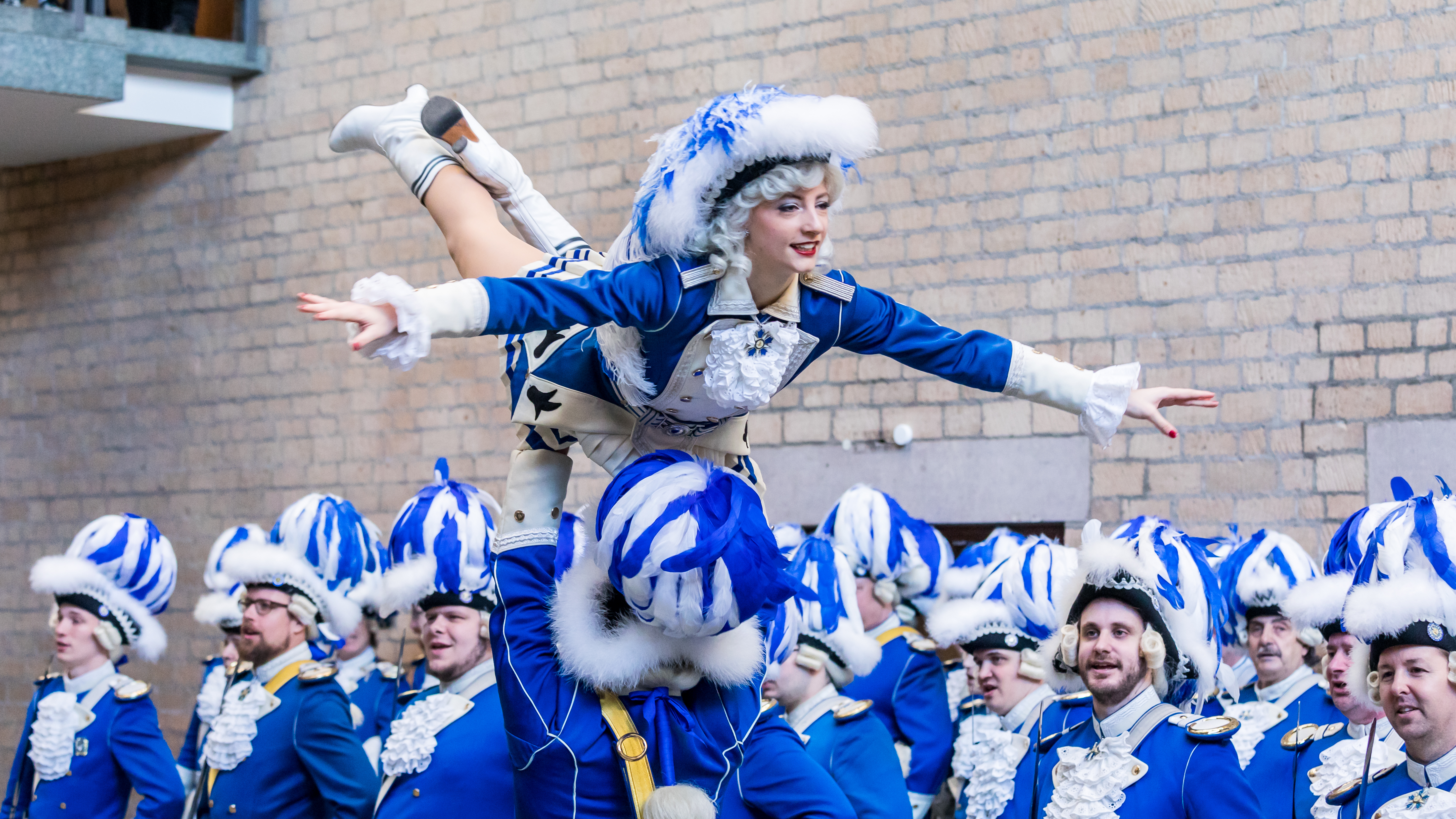 Appell Kölner Funken Artillerie blau weiß von 1870 (Blaue Funken) im Kölner Rathaus - Weiberfastnacht 2019